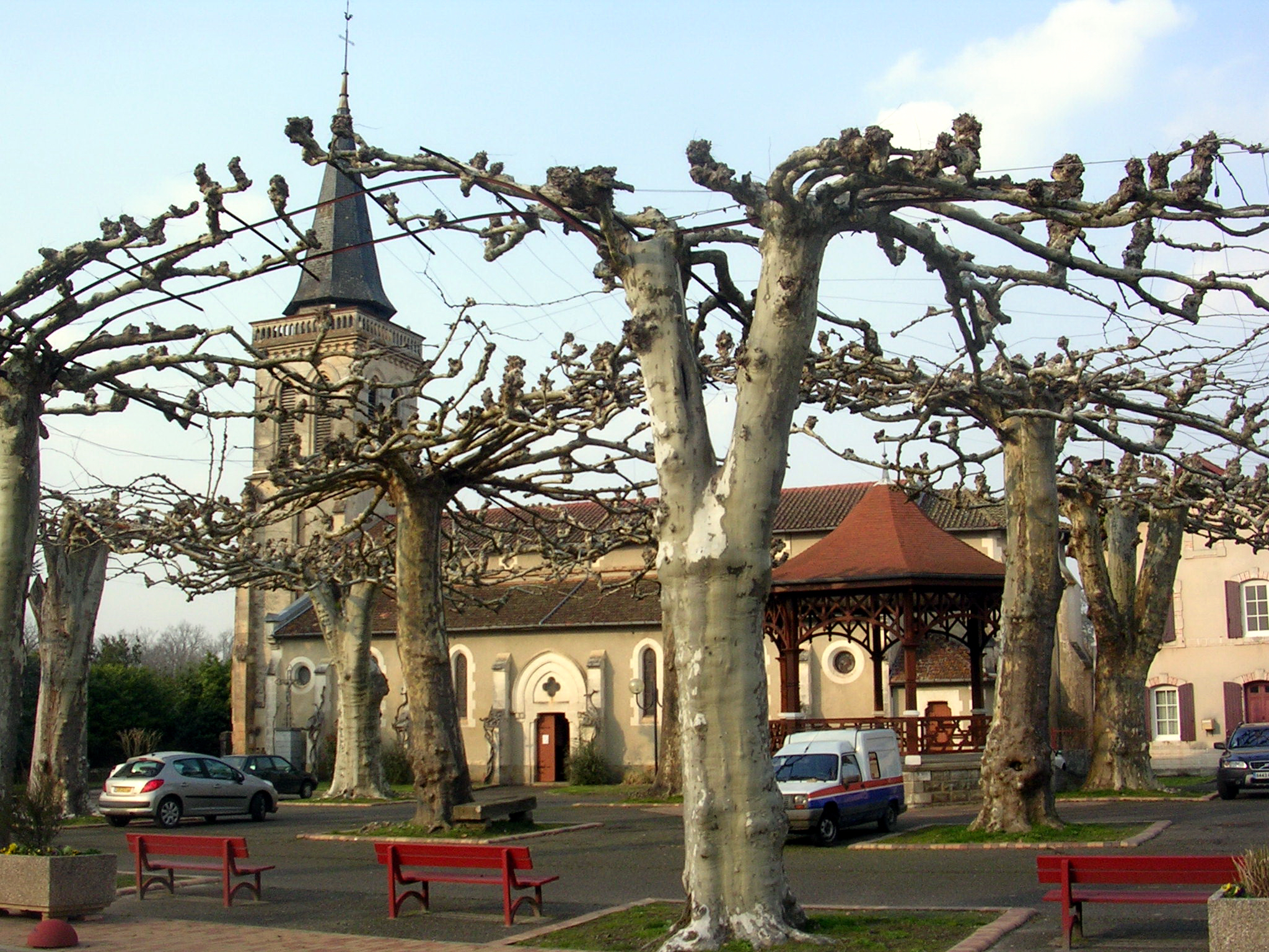 Eglise d'Arengosse, dans le département français des Landes